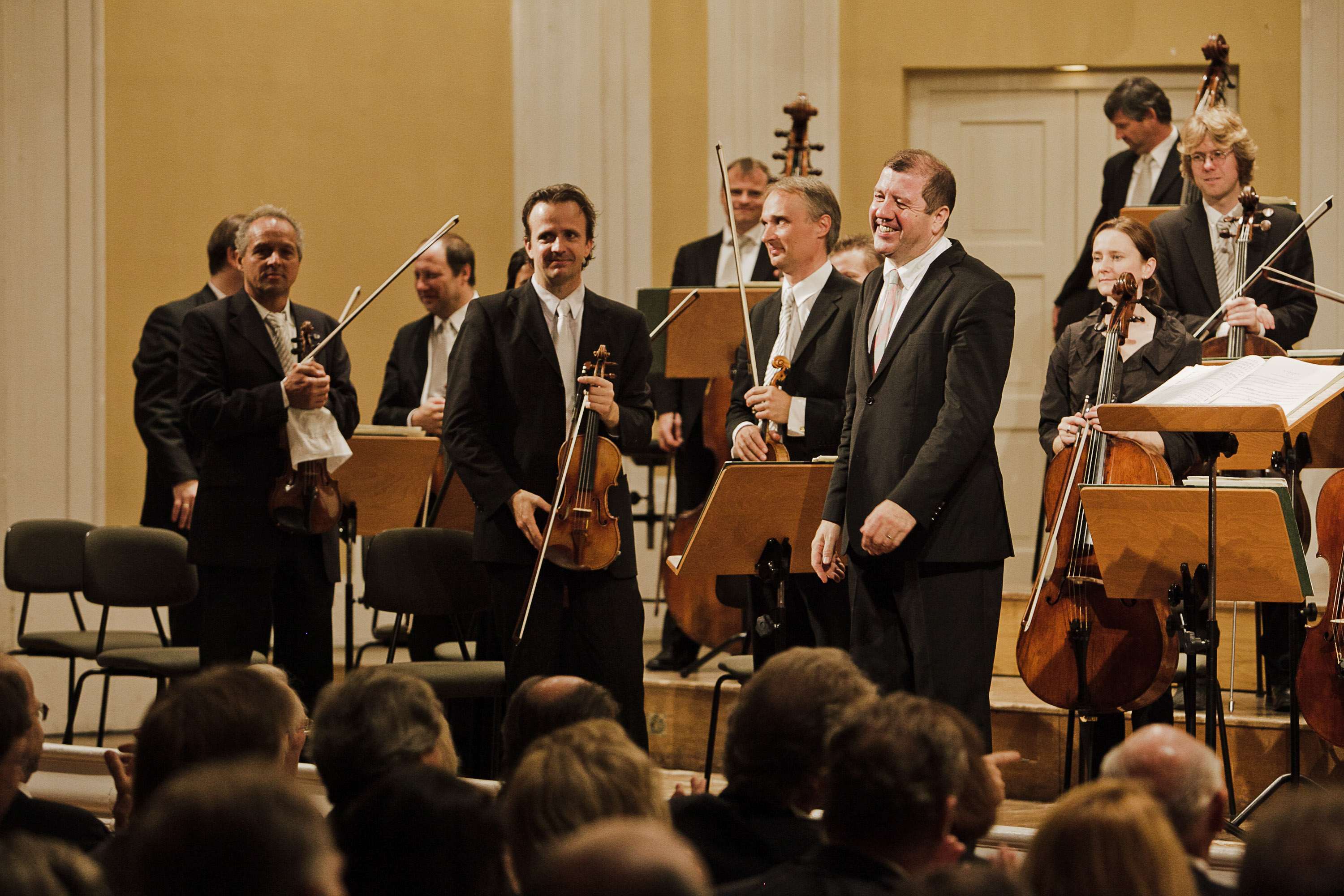 Ivor Bolton und das Mozarteumorchester bei einer Mozart Matinee bei den Salzburger Festspielen